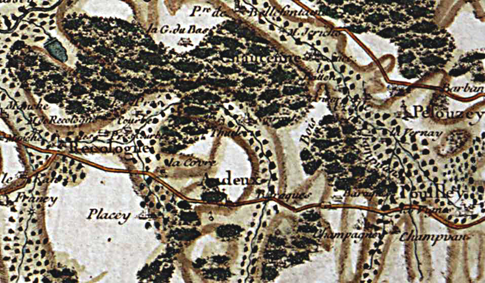 Carte Cassini du village français de Noironte (Doubs) et ses environs, levés de 1758.